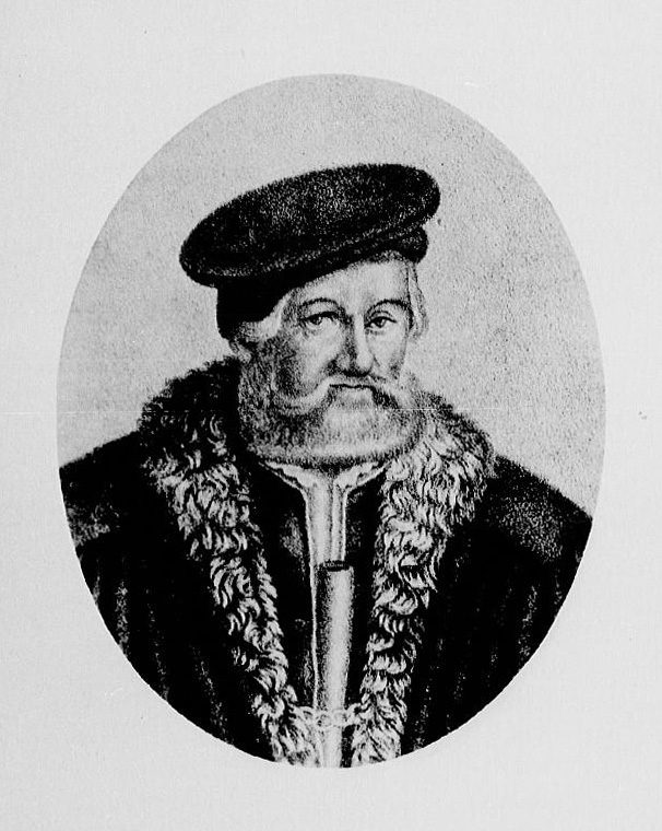 Jacques Sturm de Sturmeck, Biographies alsaciennes avec portraits en photographie, série 1